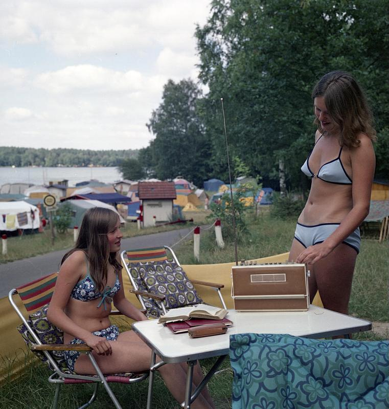 ADN-ZB/Franke/15.8.1974/Bez.Frankfurt/O: Camping-Sommer am Werbellinsee/ Seit neun Jahren sind Erika und Andrea Elter (l) aus Kamenz Sommergäste auf dem Werbellinsee-Zeltplatz "Süßer Winkel".